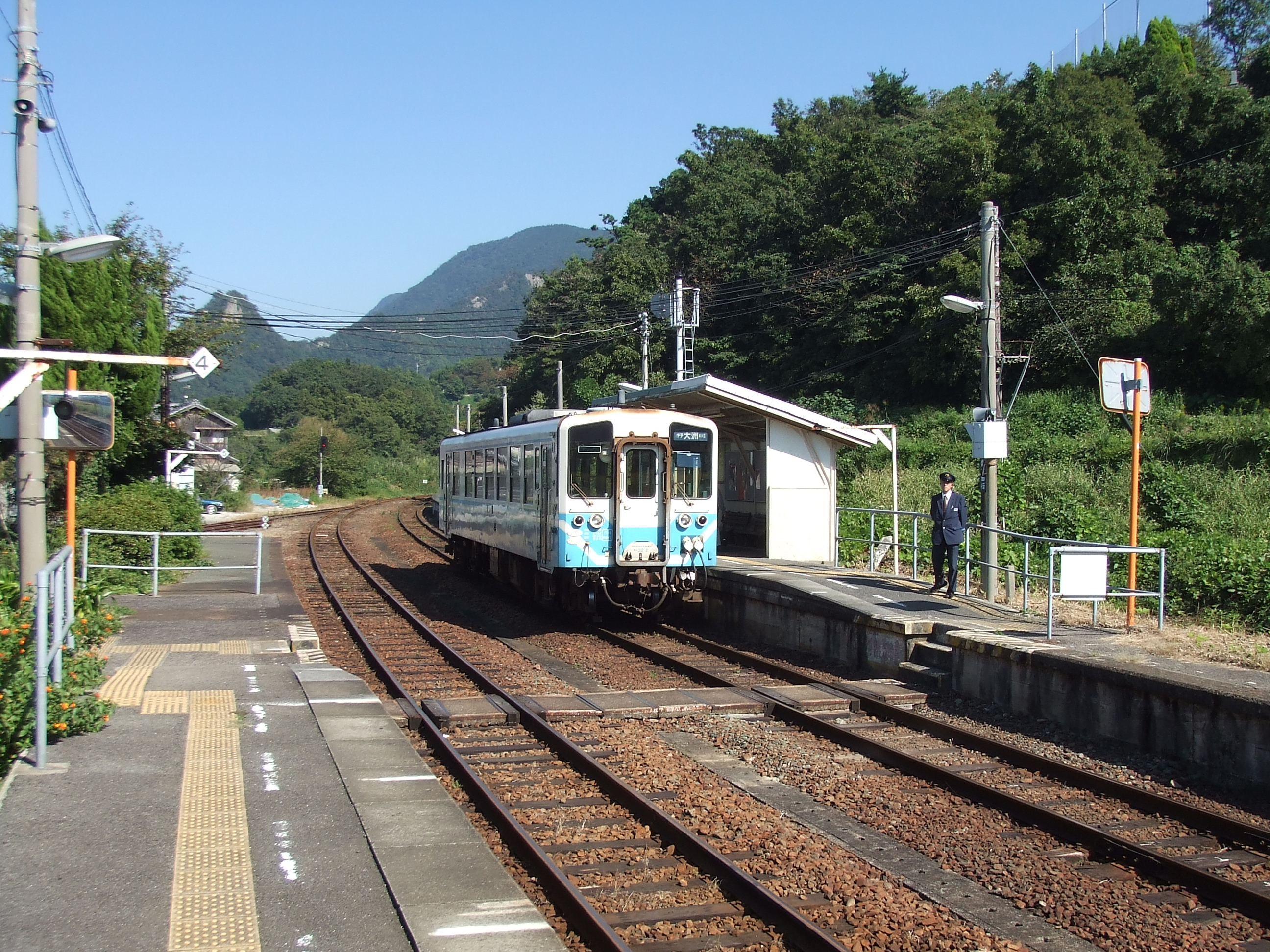 伊予上灘駅 ホームの様子